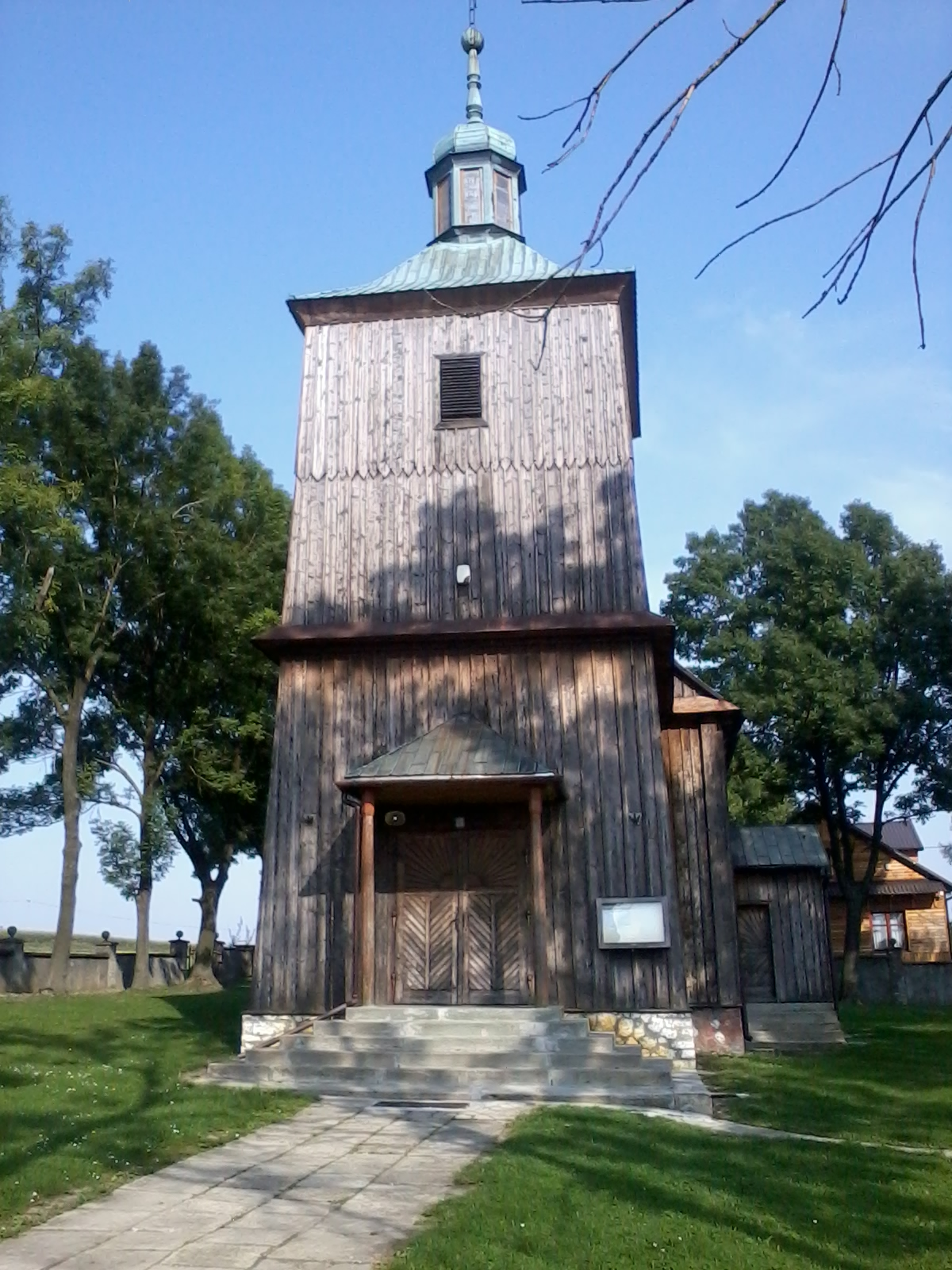 Mostek - rzymskokatolicki kościół parafialny p.w. Matki Boskiej i św. Izydora, 1571, 1732 (kościół przeniesiony ze Smardzowic w 1938 roku9